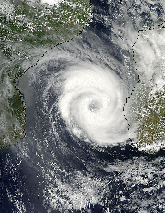 Image du cyclone Haruna dans le sud du canal du Mozambique entre l'île Europa et Madagascar prise le 20 février 2013 à 11:15 UTC par le instrument MODIS à bord du satellite de la NASA Aqua